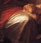 detail 4